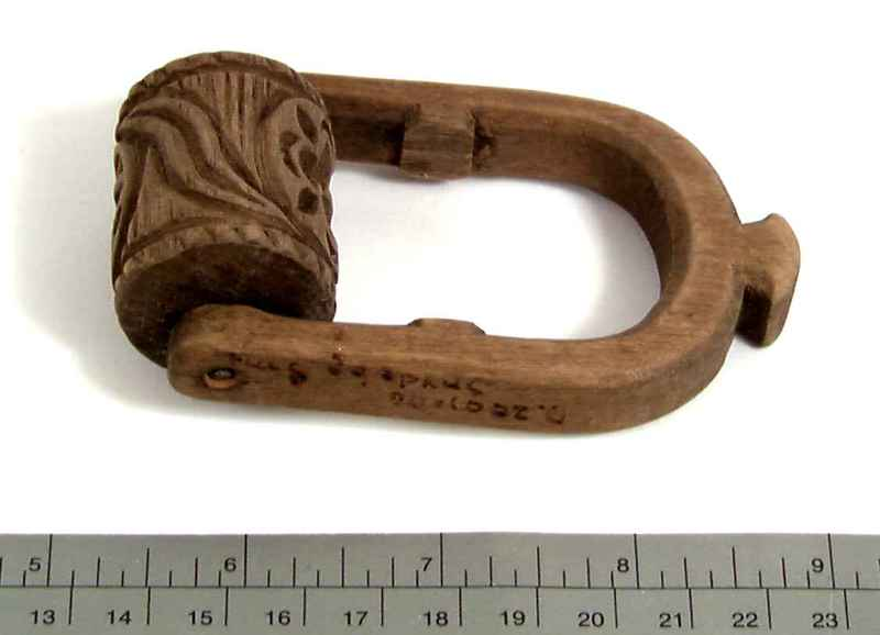 Smørrull fra Sarpsborg i Østfold, antakelig fra 1800-årene. Foto Anne-Lise Reinsfelt / Norsk Folkemuseum, NF.1906-2001.